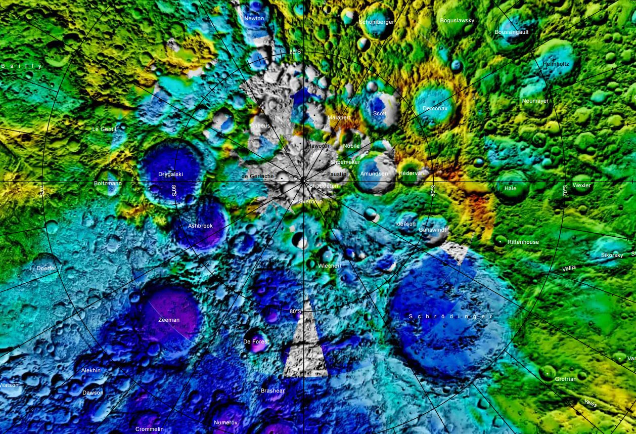 Cráter lunar Ganswindt. Localización (Imagen LRO)